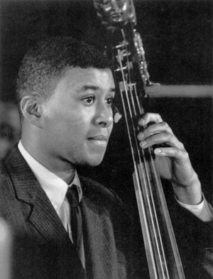 Bajista norteamericano de jazz